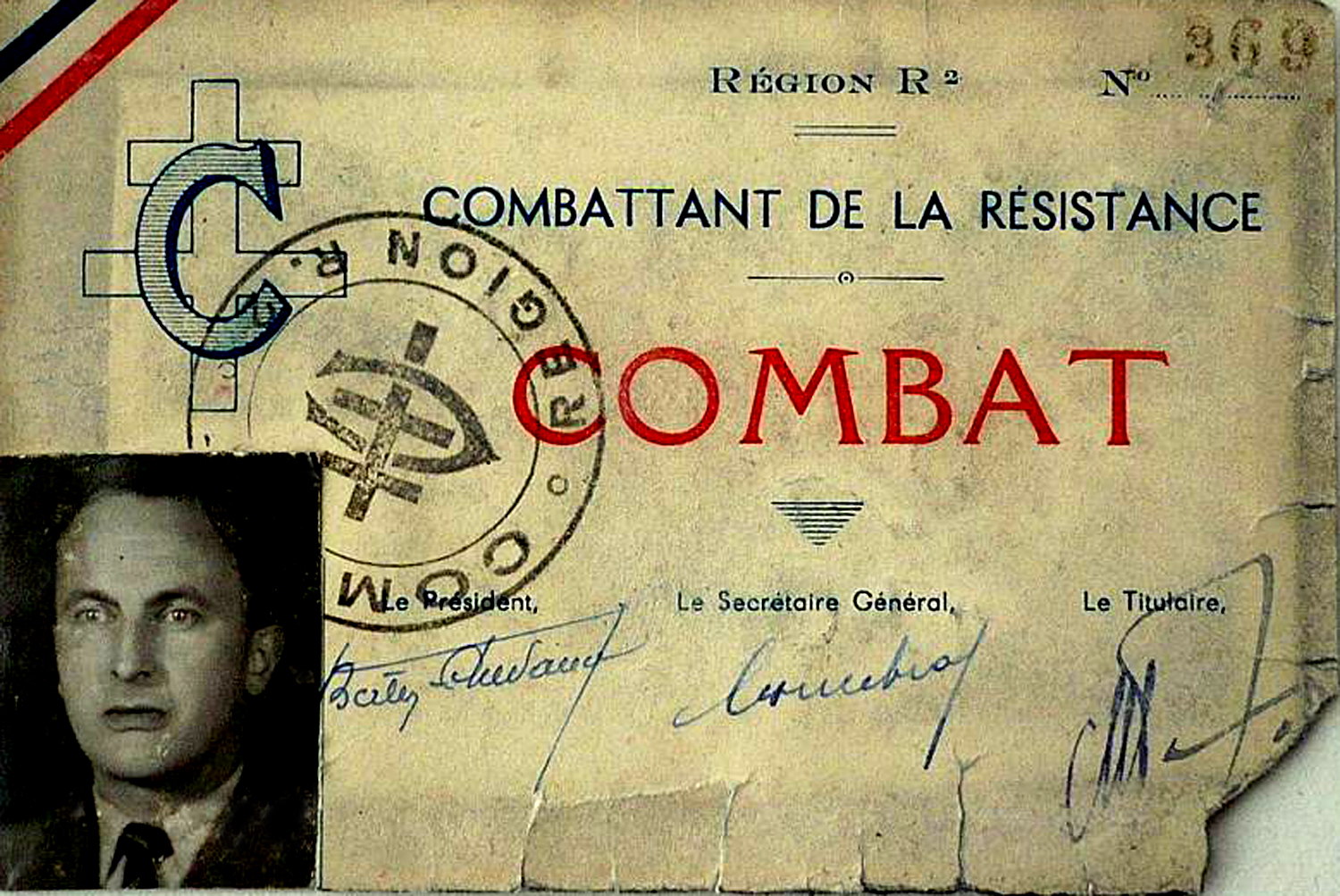 Carte identité Combat Région R 2 Marseille